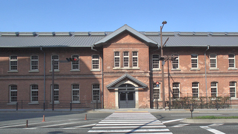 九州鉄道記念館本館 (旧九州鉄道本社) ・正面